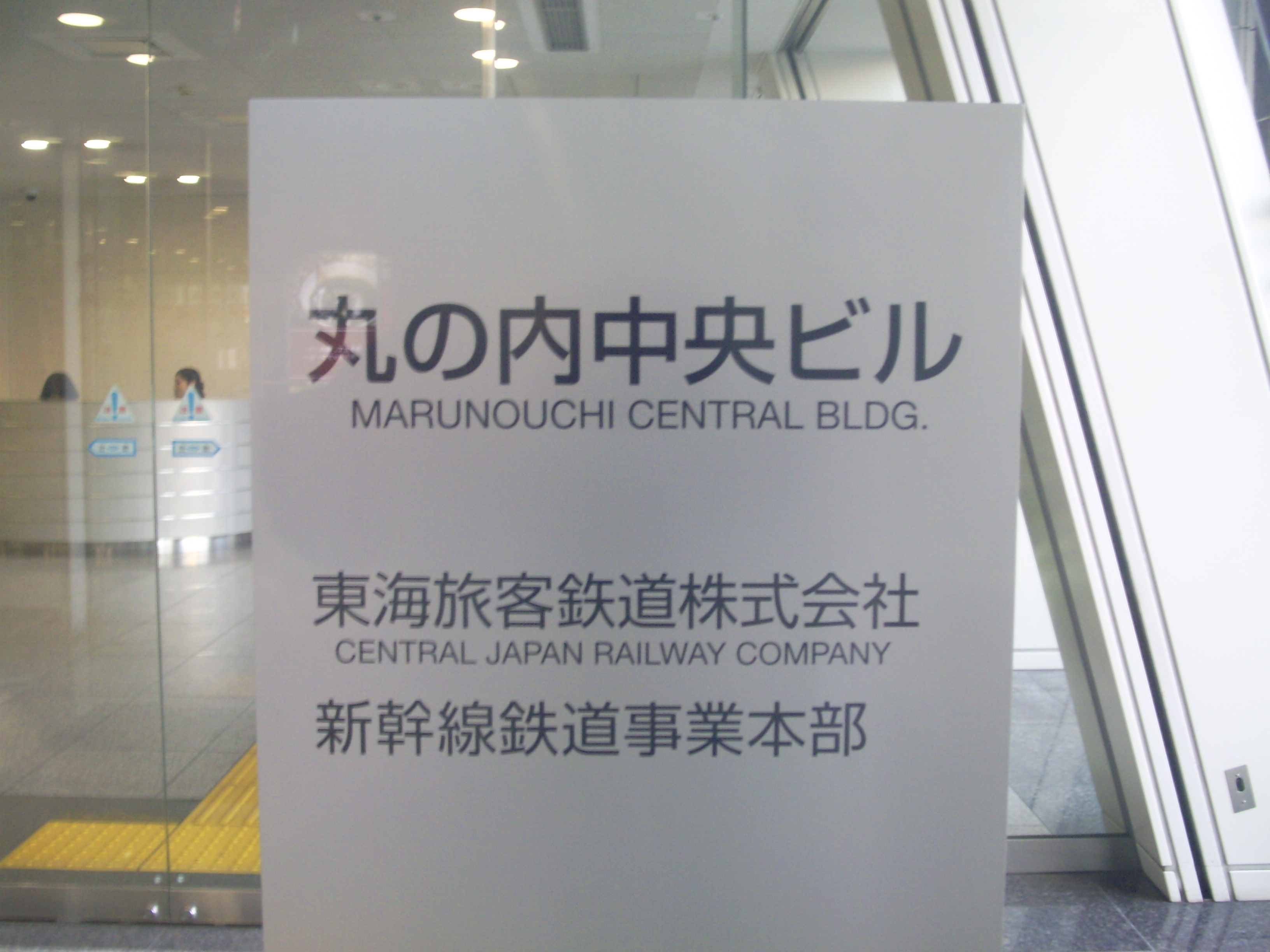 東京駅日本橋口となる丸の内中央ビル（JR東海所有）に入居する新幹線鉄道事業本部のプレート ㊟カメラを起動すると日付機能が出荷時のものに初期化されるため、ファイル履歴の投稿日時とメタデータの原画像データの生成日時が異なります（本概要欄の下記日付が撮影日）